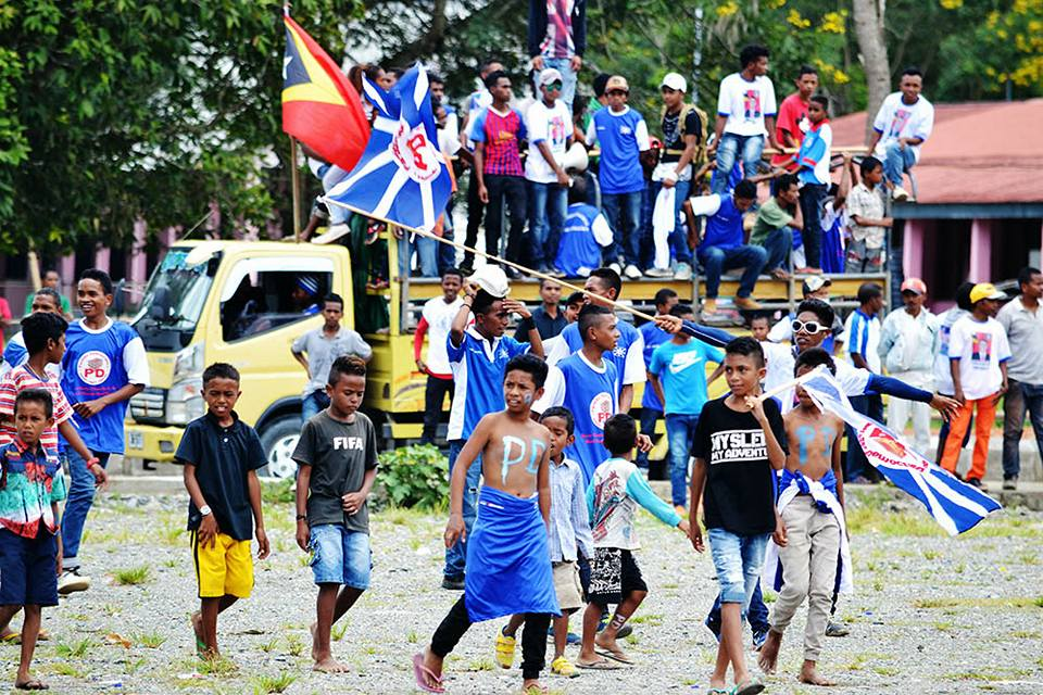 Wahlkampfveranstaltung in Gleno von António da Conceição.